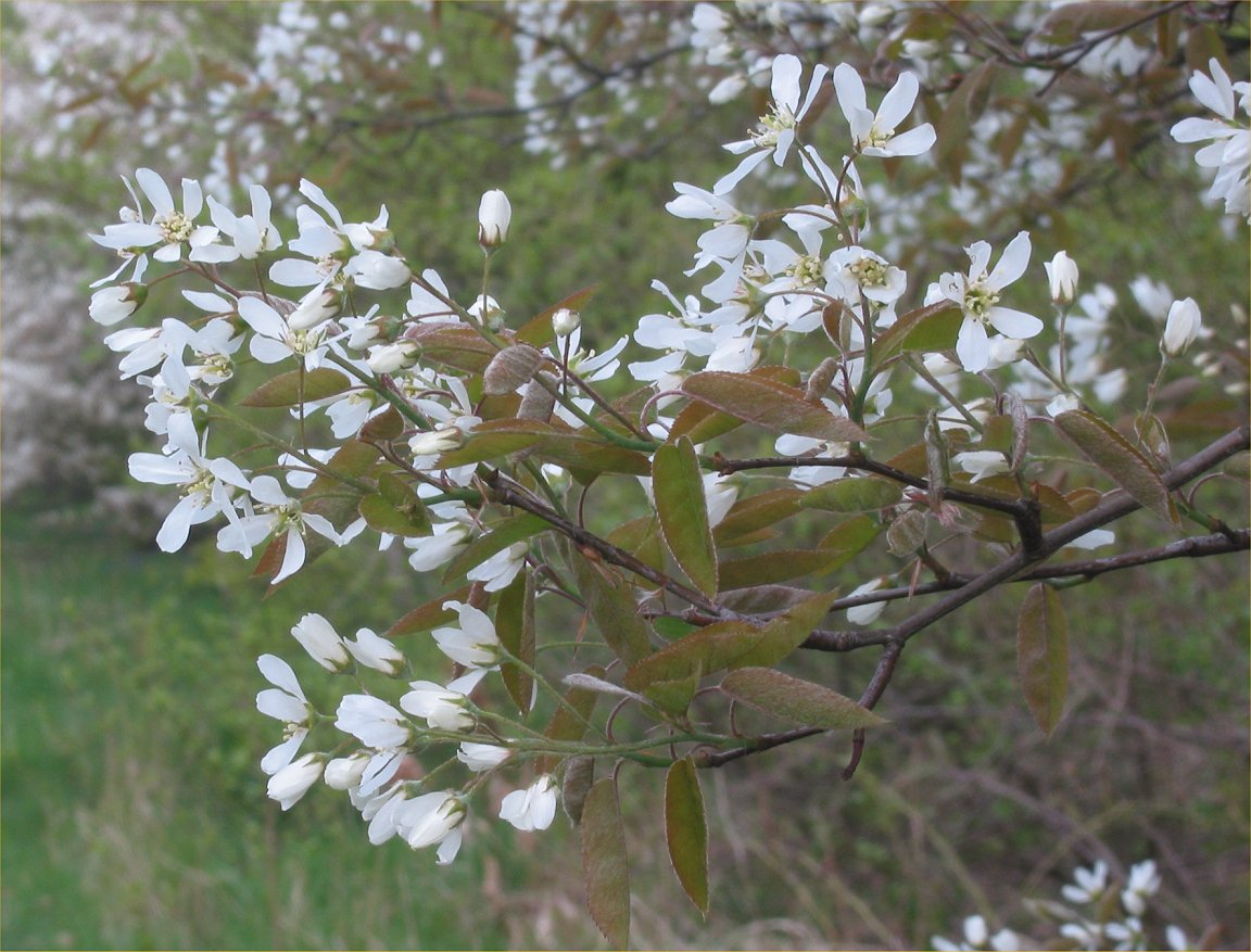 Amelanchier lamarckii bloeiwijze